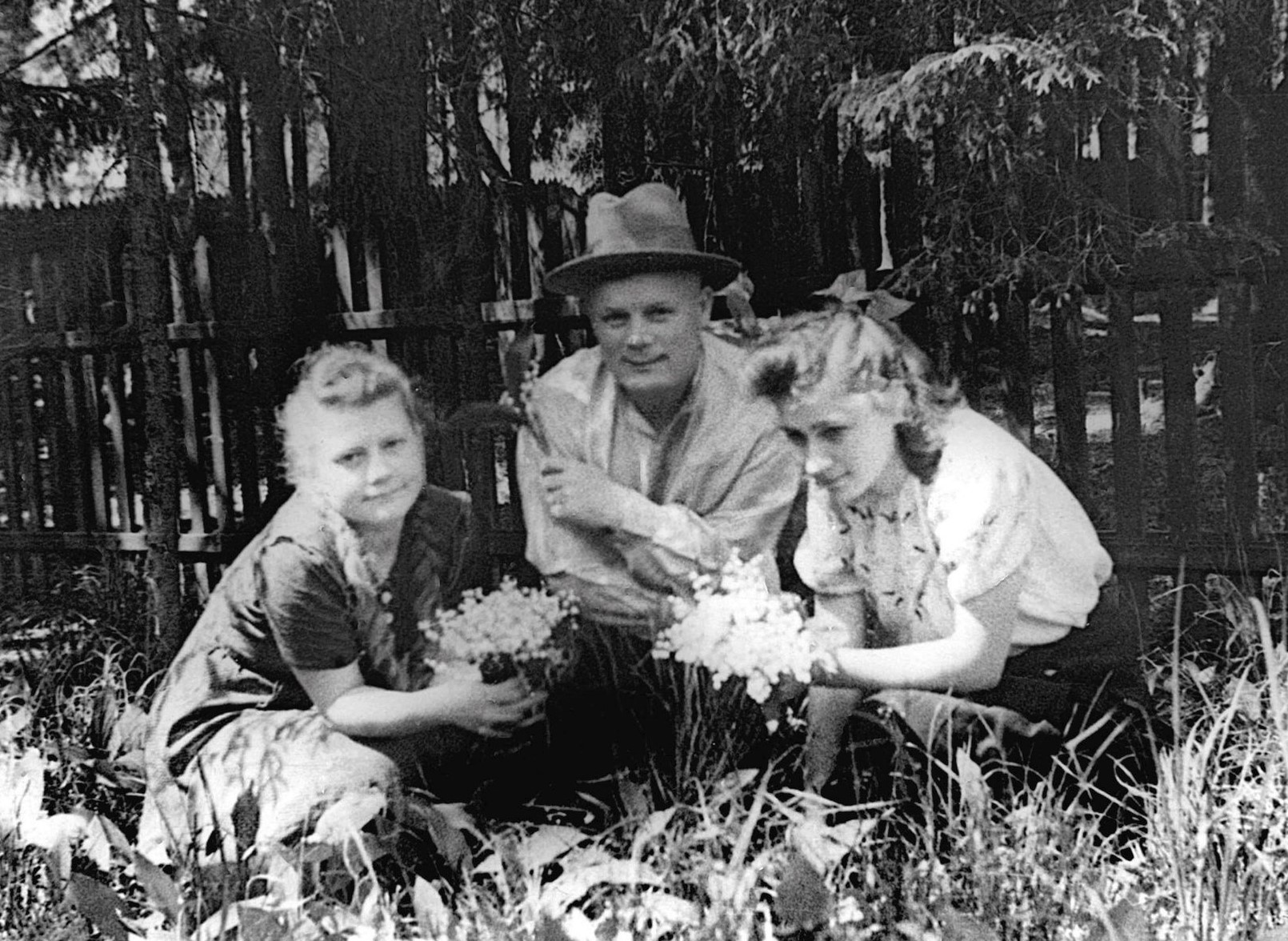 Филипп Иванович Голиков на даче с дочерью и её подругой